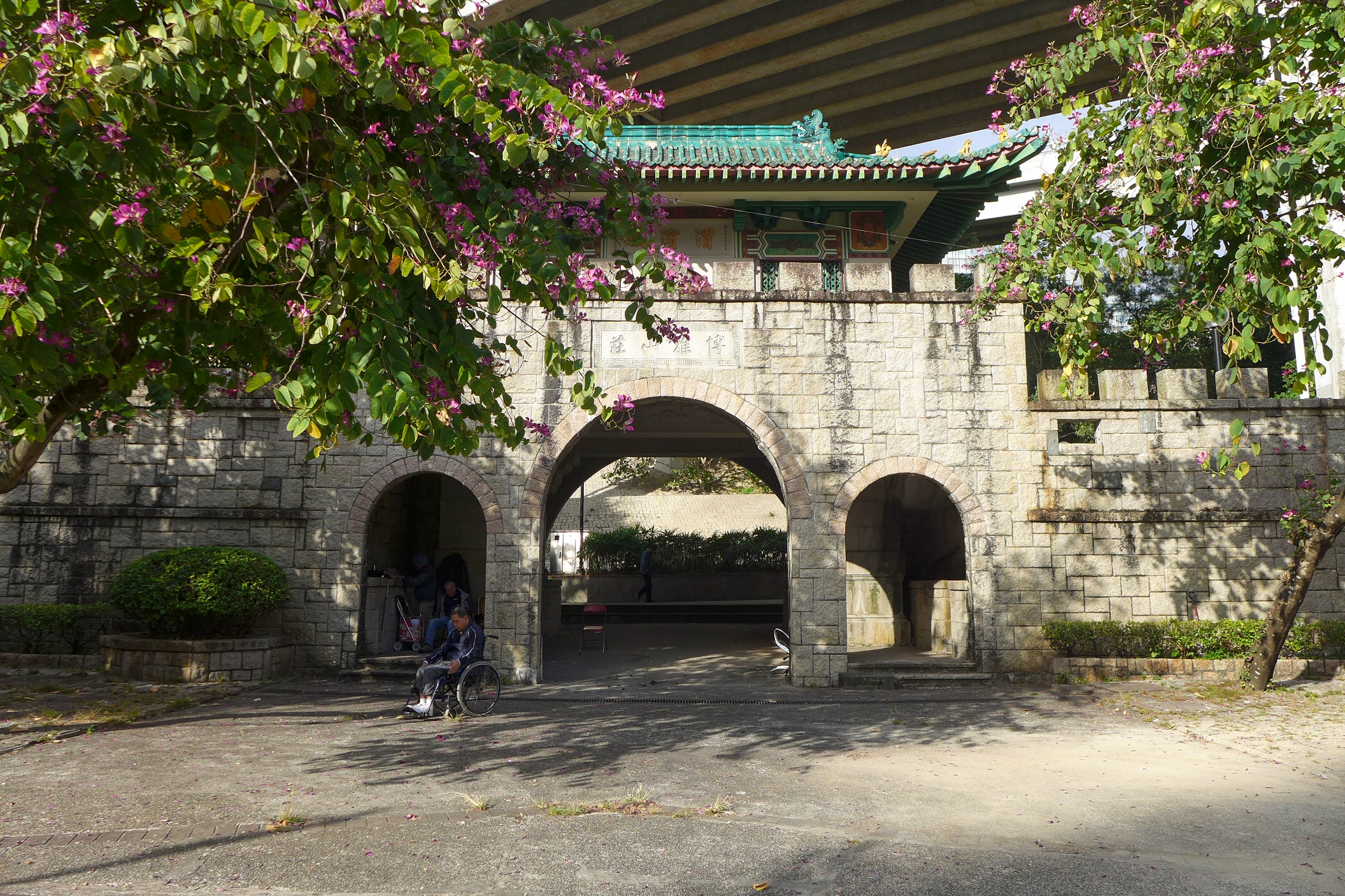 Wai Bun Castle, Tai Wai